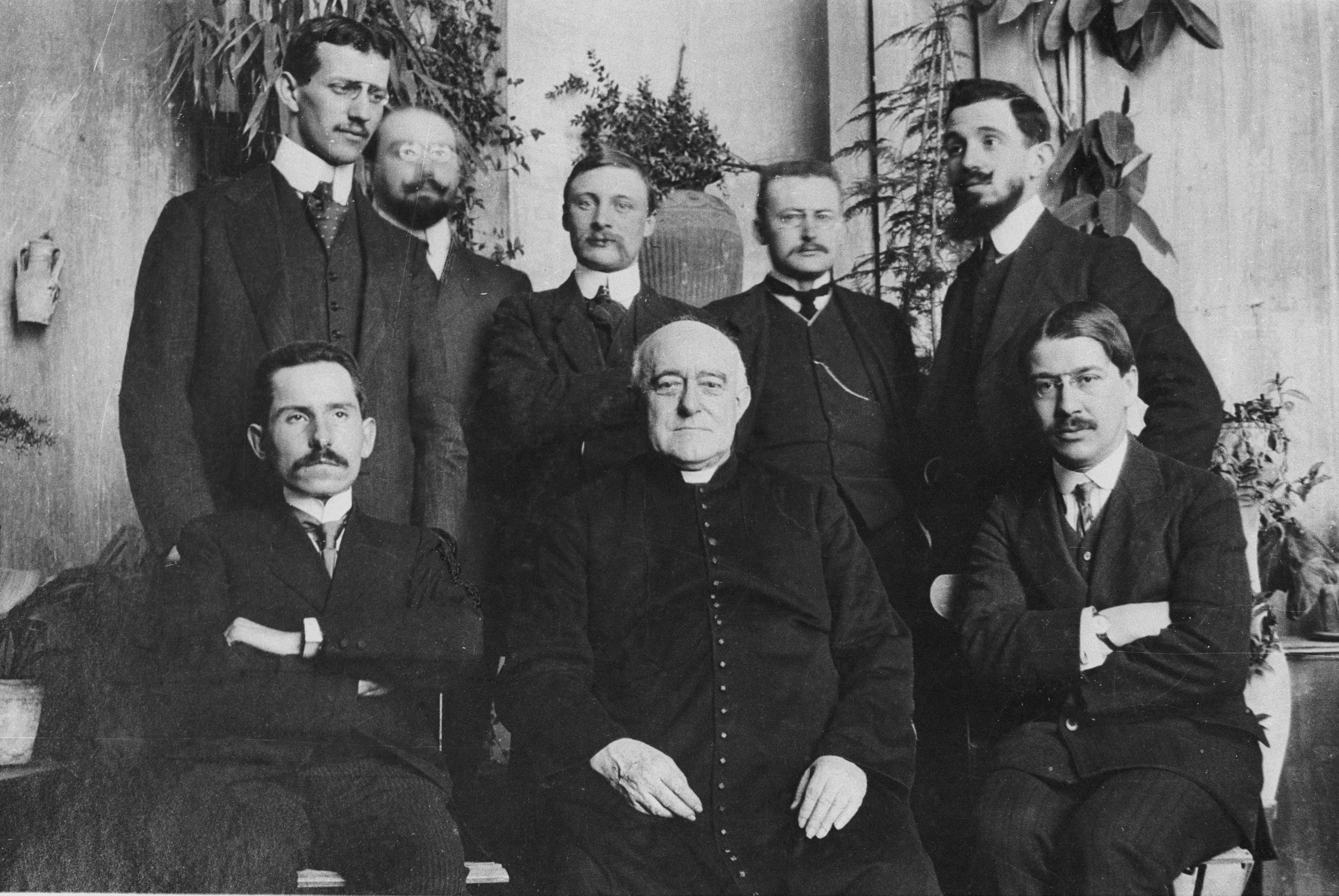 Légende : De haut en bas, de droite à gauche . Second rang : le futur ambassadeur René Massigli, le futur ministre Lucien Romier, le futur conservateur de la bibliothèque municipale de Versailles Charles Hirschauer, Alain de Boüard, Dominique Anziani Premier rang : H Waquet, Monseigneur Louis Duchesne, Robert Fawtier. Cliché de la promotion 1911-1912 de l'Ecole française de Rome.